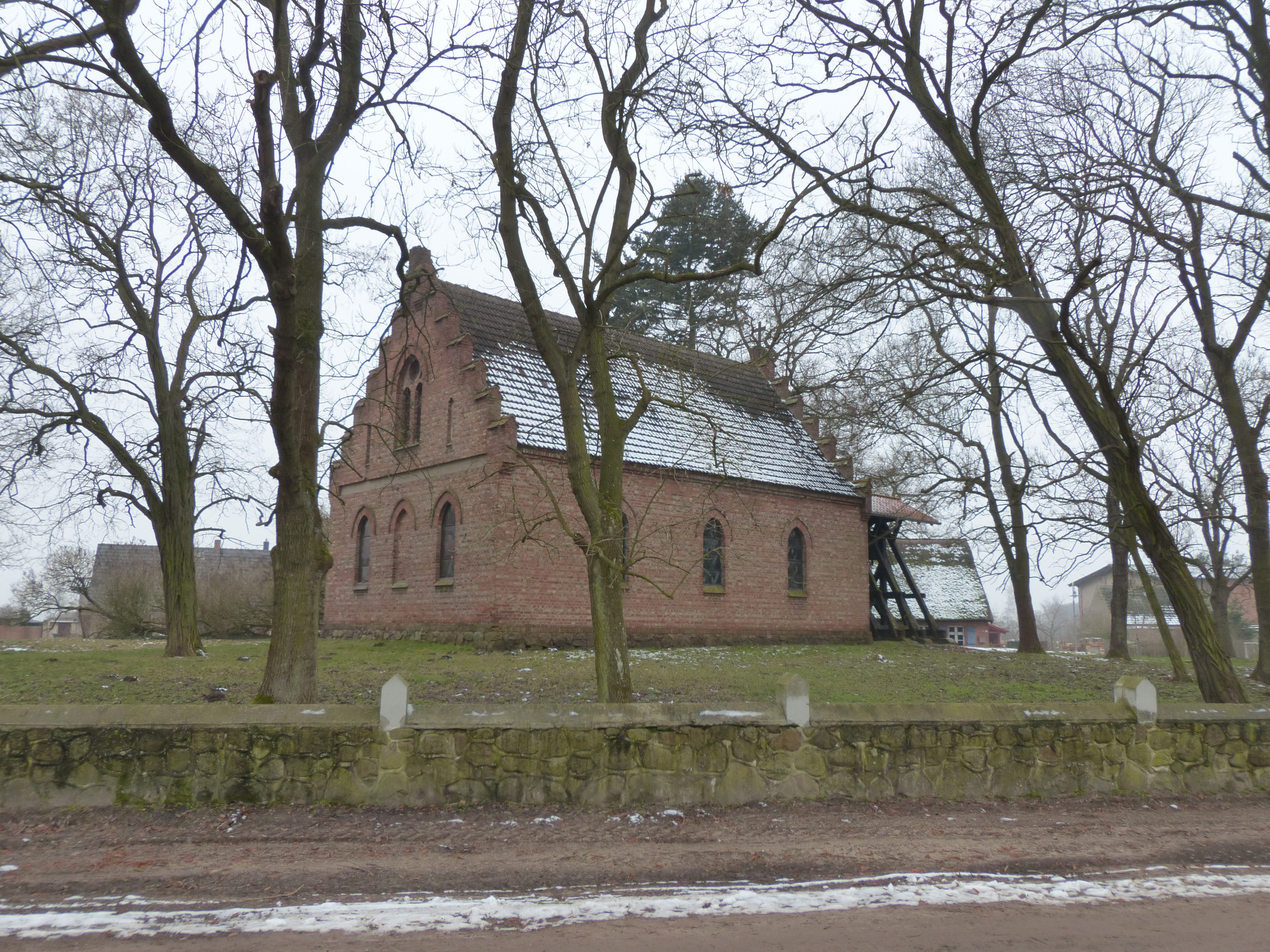 Kirche in Lübs (Vorpommern), Ansicht von Nordosten